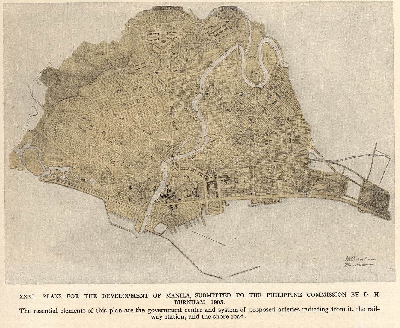 Plan de Manille